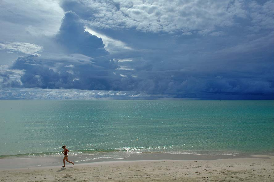 Бегун на пляже